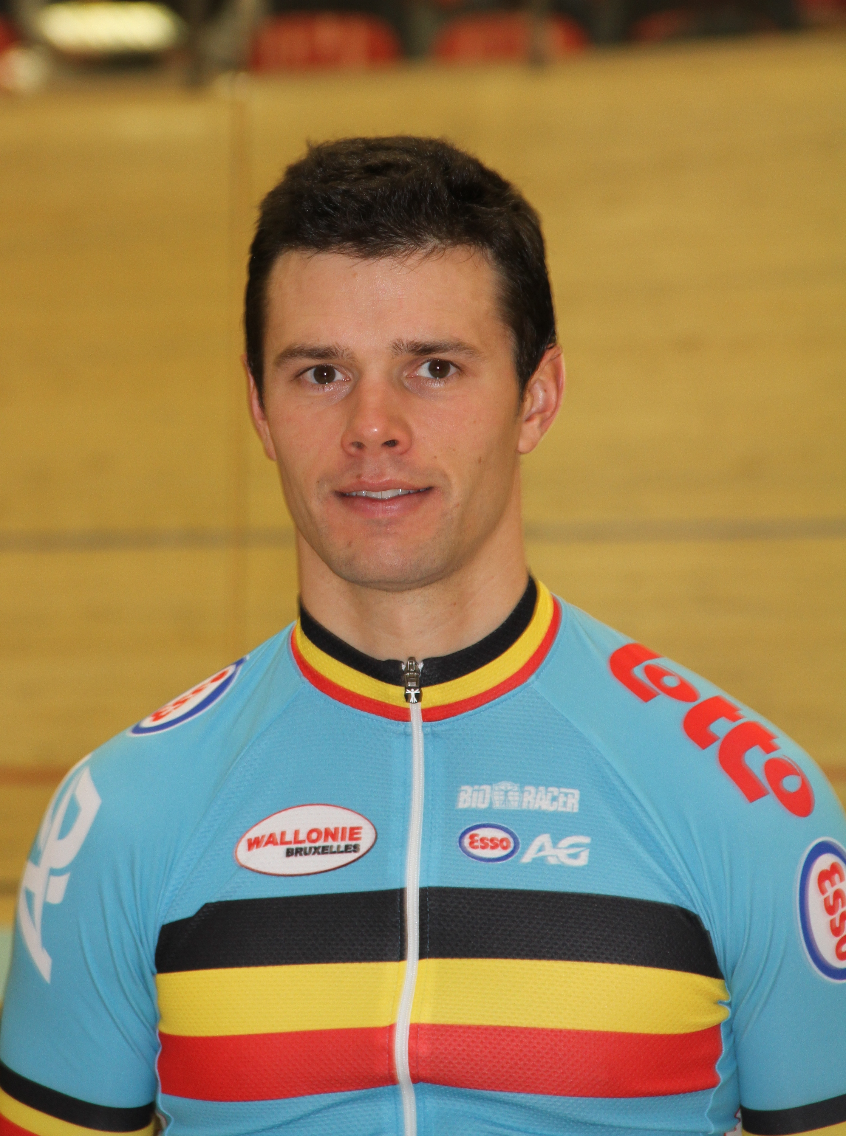 Jonathan Dufrasne, belgischer Radsportler The making of this document was supported by the Community-Budget of Wikimedia Germany.